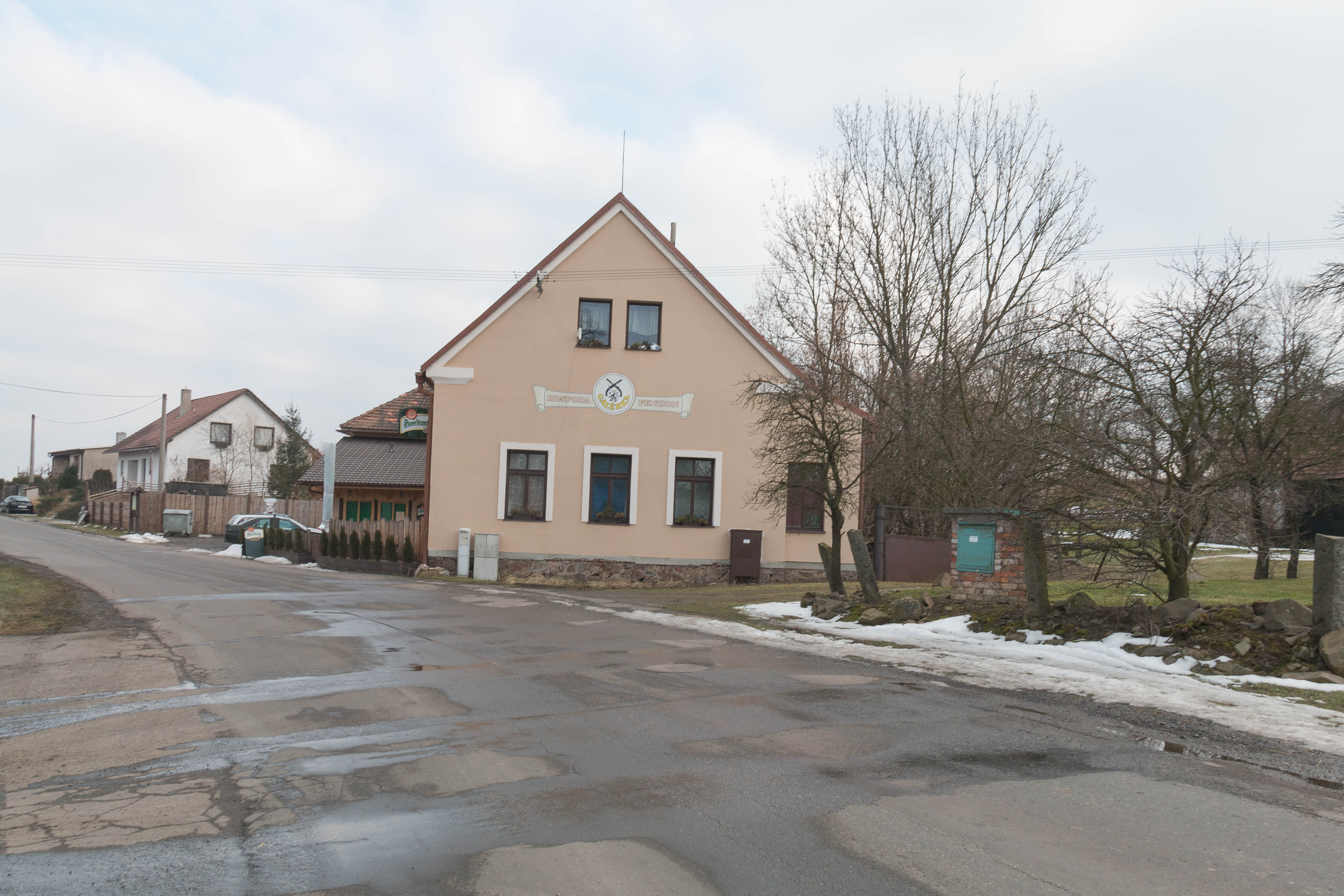 Ochoz u Nasavrk hospoda Galérka